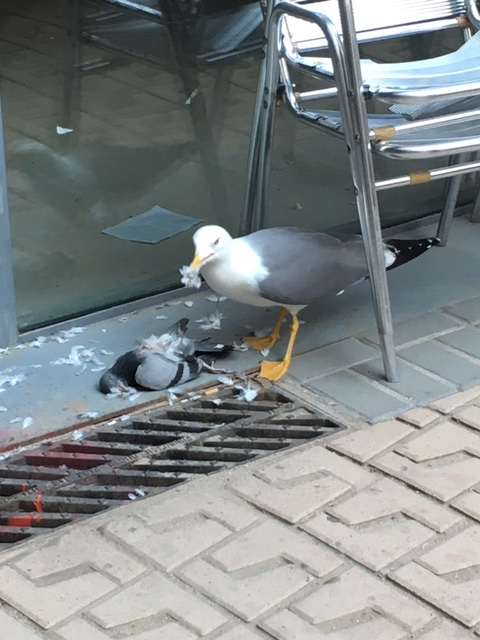 Gavina deborant un colom al pati de la Facultat de Geografia i Història de la Universitat de Barcelona.